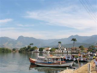 Vue sur le port de Paraty (Brésil).